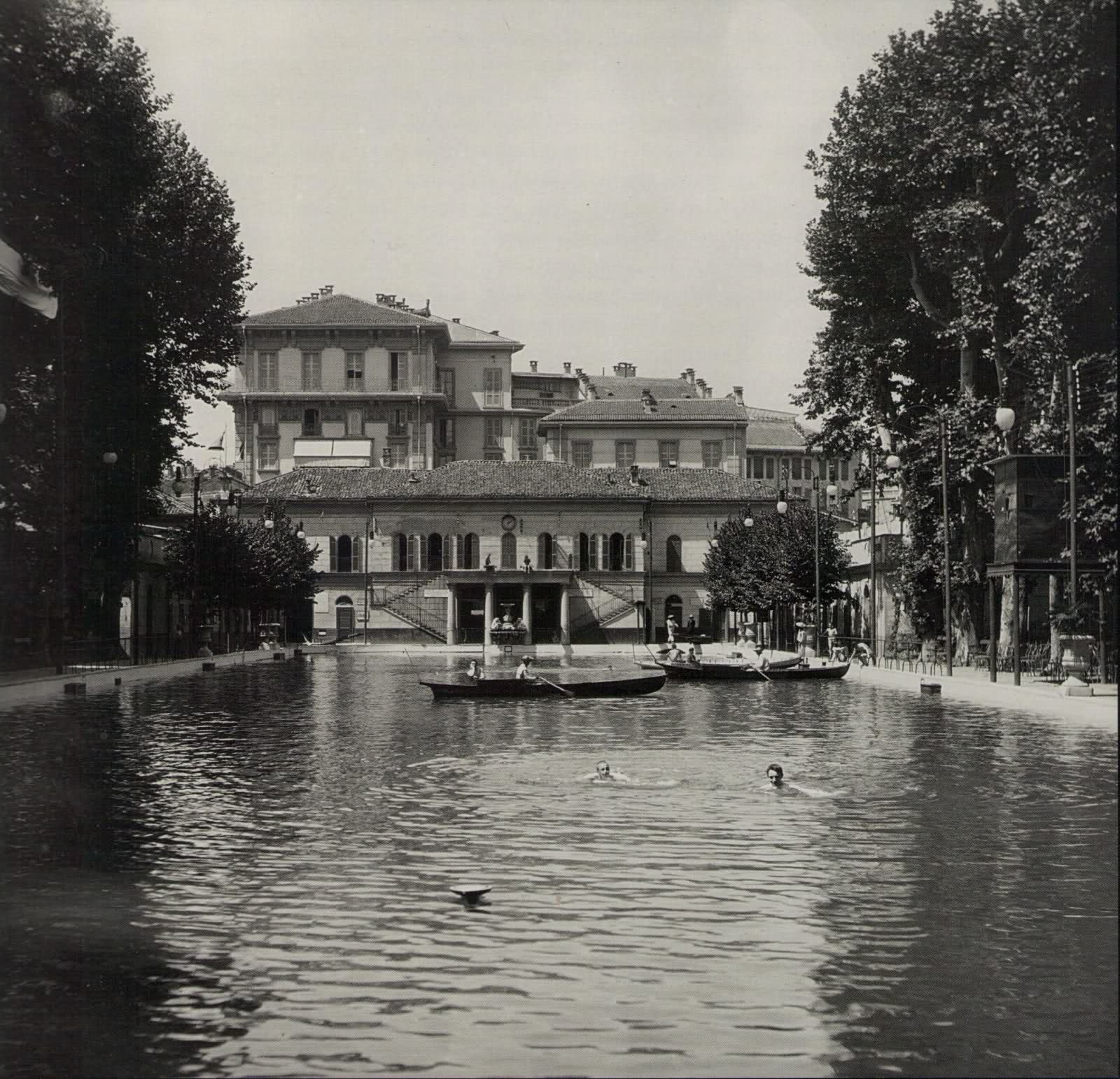 Bagno Diana, 1906, foto Emilio Sommariva, gelatina ai sali d’argento su vetro, 30×40 cm. Biblioteca Nazionale Braidense, Milano.